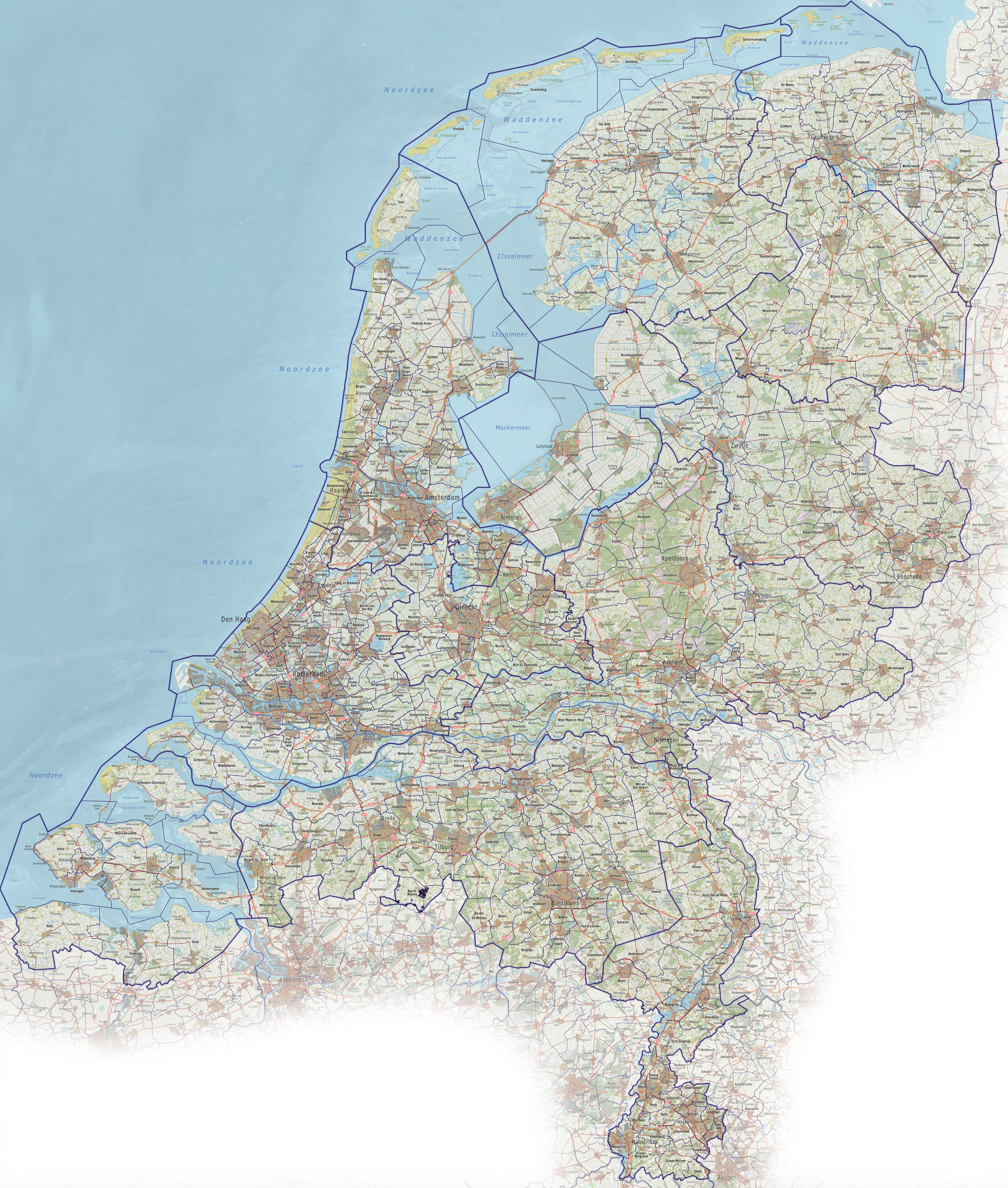 Detaikaart van Nederland, met gemeentegrenzen per 2012. Referentie-ondergrond (kustlijn, steden, wegen) gerasterd uit de OpenStreet Map OSM. Inhoud is beschikbaar onder de Creative Commons Attribution-ShareAlike 3.0 license. Referentie-ondergrond op water bewerkt vanuit Gebruik is vrij met bronvermelding NLR en ESA. Vectorgrenzen van gemeenten op basis van het vrij te gebruiken geo-bestand van het CBS. Hoogte-aanduidingen (reliëf) gerasterd uit de AHN Viewer ( gebruik is vrij met bronvermelding (c) AHN, Overige kenmerken op de kaart: eigen tekenwerk.